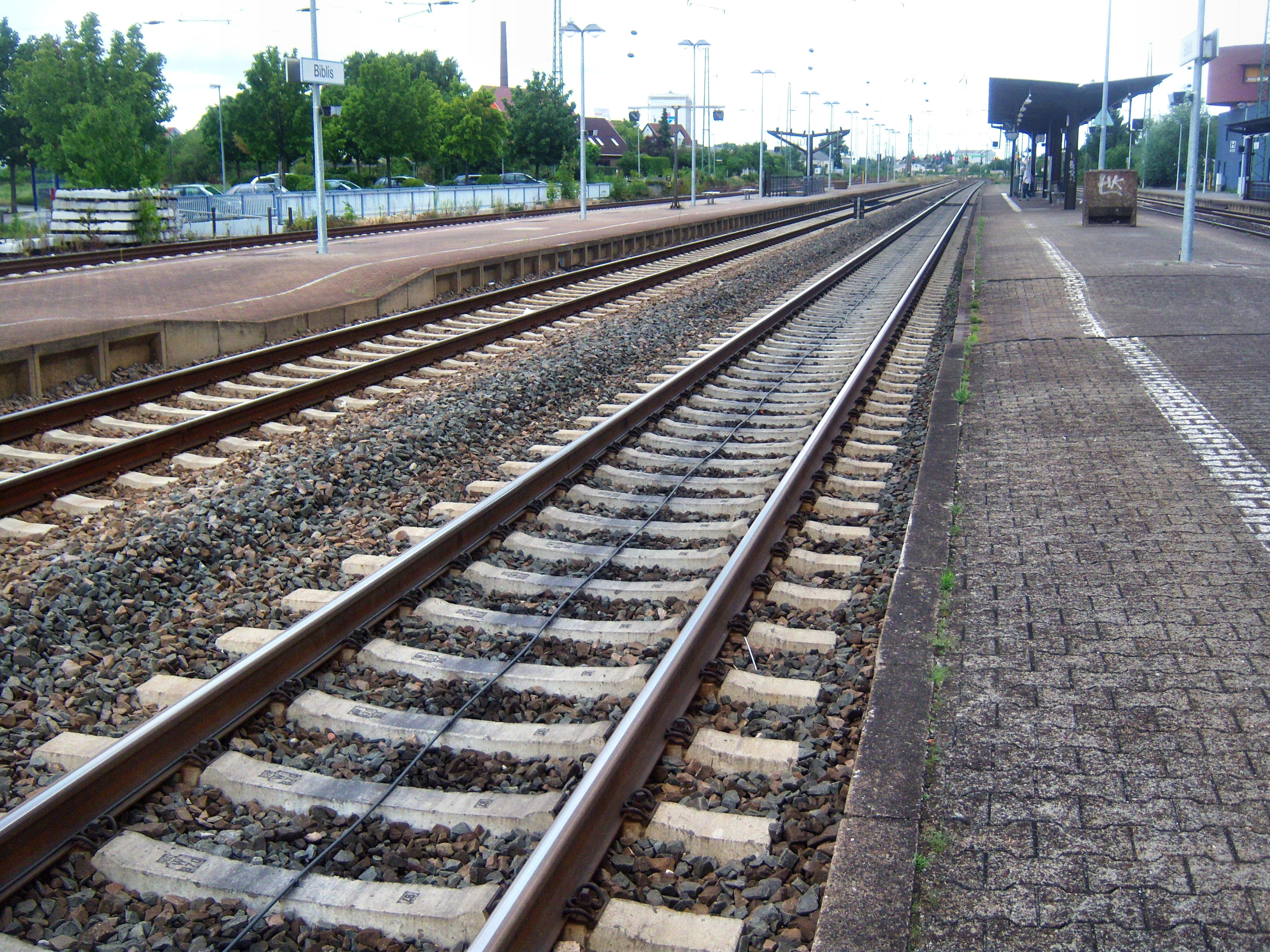 Linienzugbeeinflussung der Riedbahn im Bibliser Bahnhof